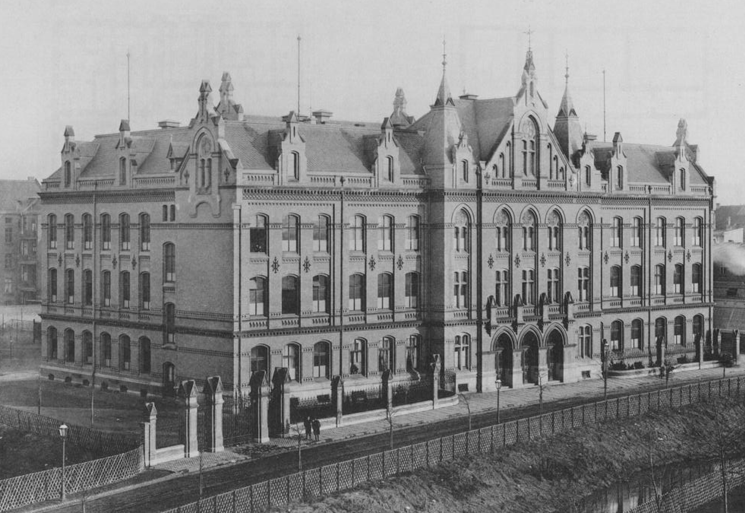 Städtische Realschule an der Prinz-Georg-Straße, Schuljahr 1896–1897, Lichtdruck und Aufnahme von Wilh. Otto, Düsseldorf